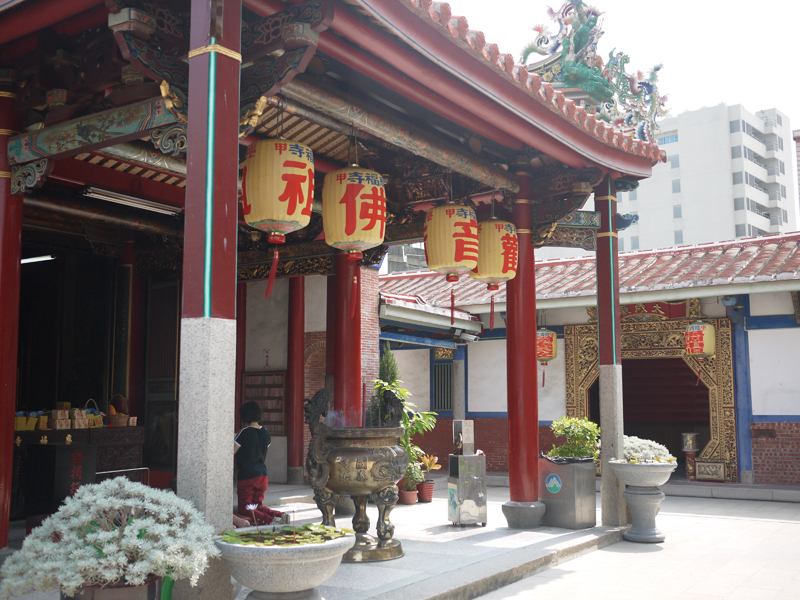 學甲慈濟宮後殿(慈福寺) Bân-lâm-gú: Ha̍k-kah Tsû-tsè-kiong āu-tiān(Tsû-hok-sī). 學甲慈濟宮後殿(慈福寺)